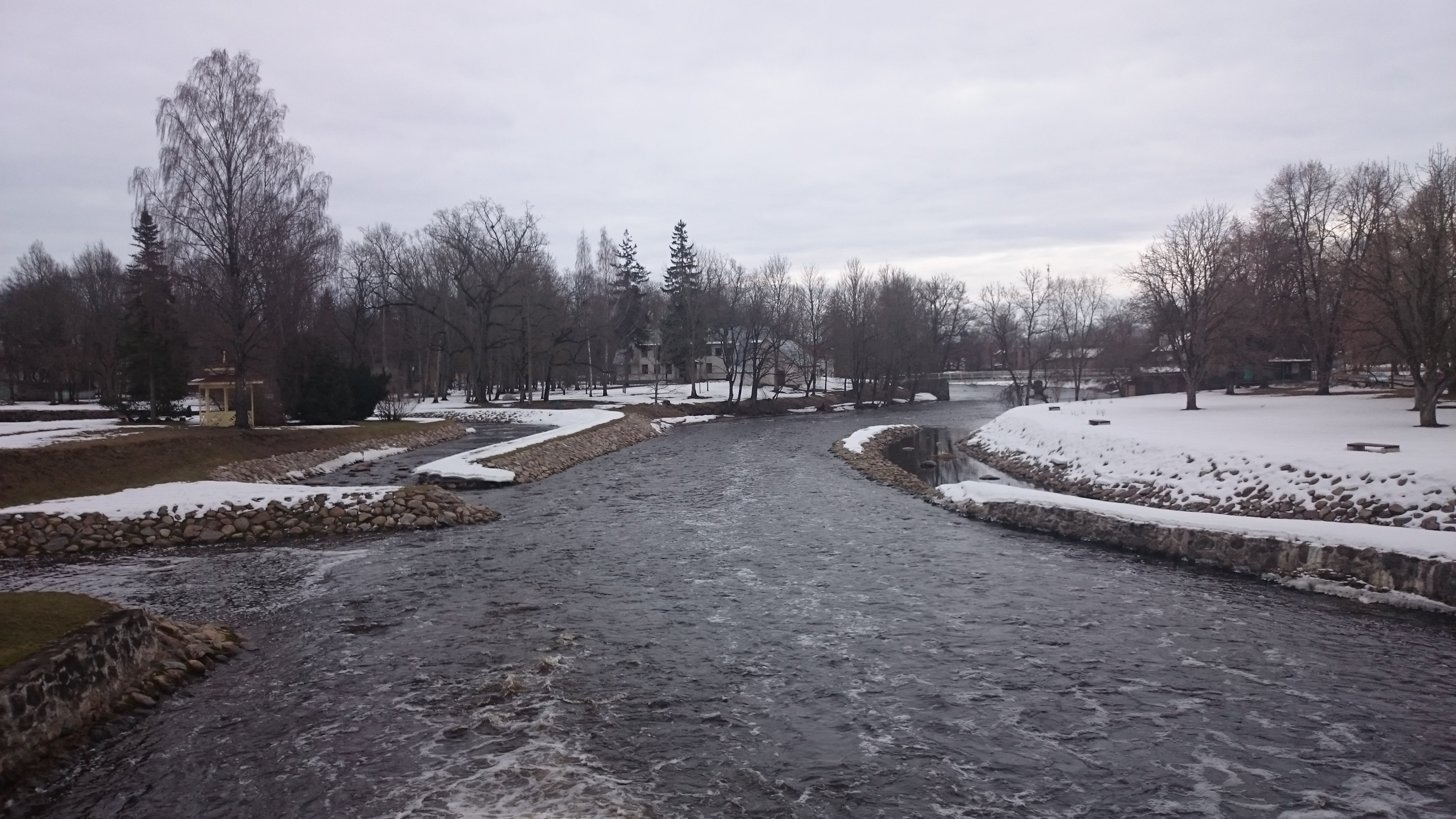 Põltsamaa qui traverse Põltsamaa